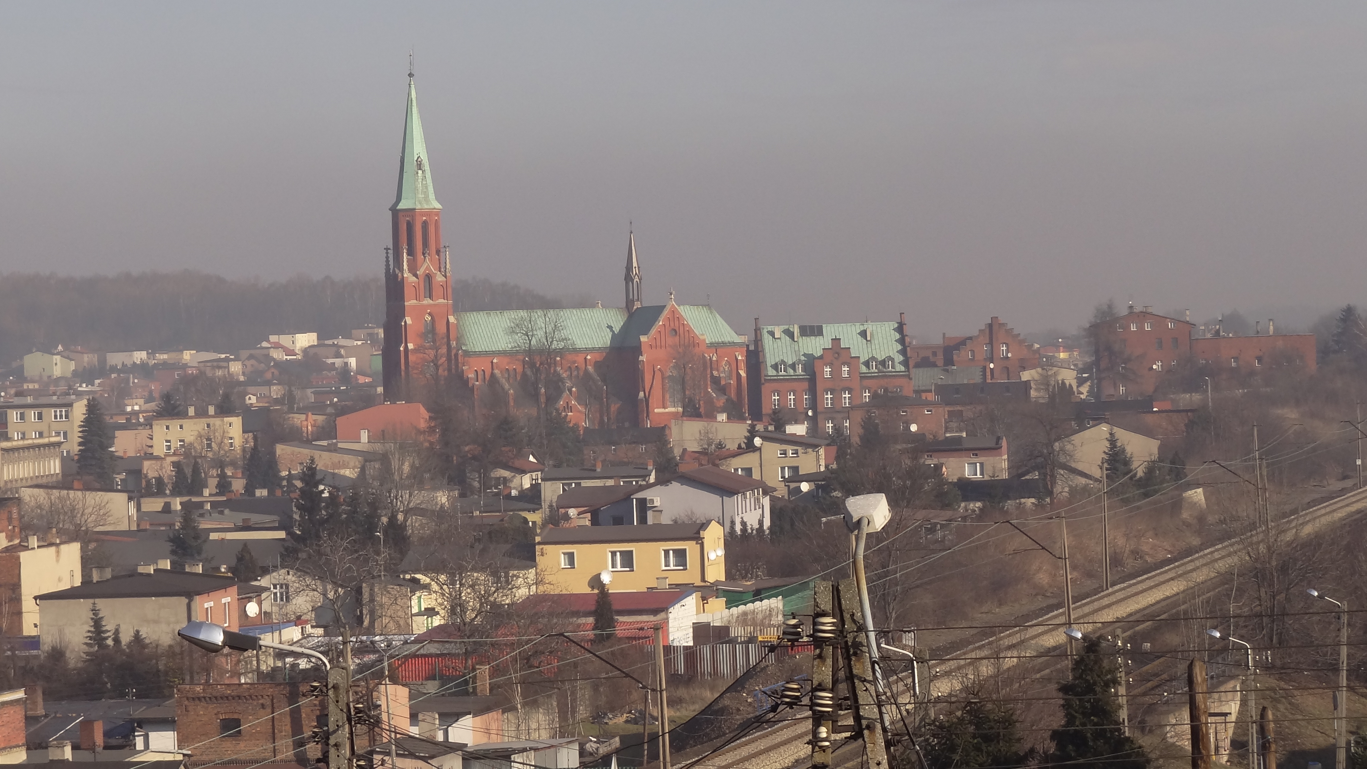 Ciekawa Kraina.